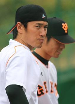 ジャイアンツ片岡選手